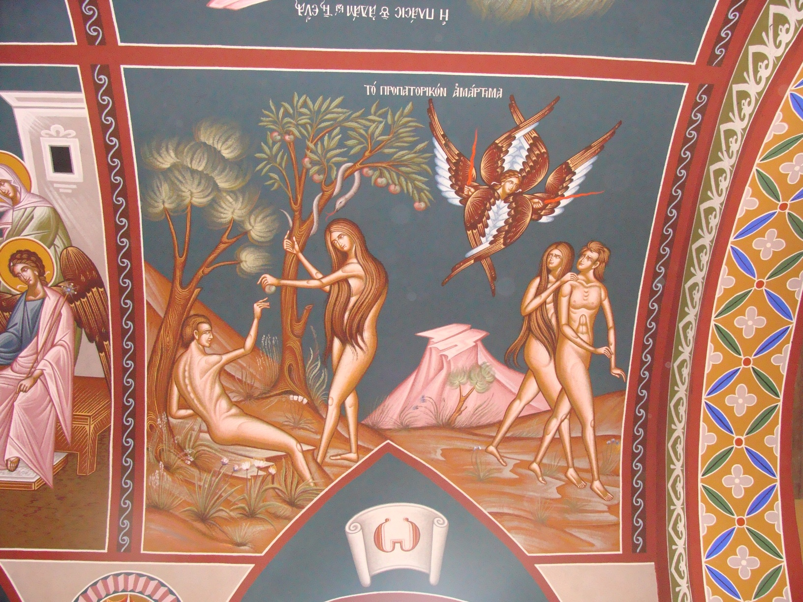 "Le péché originel", fresque sur la voûte de la nef de l'église Saint-Michel de Ghisonaccia (par N. Giannakakis, 1983)